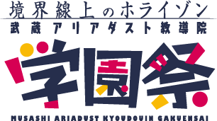 Logotipo del evento, Musashi Ariadust Kyoudouin Gakuensai para la serie de anime, Kyōkai Senjō no Horizon.